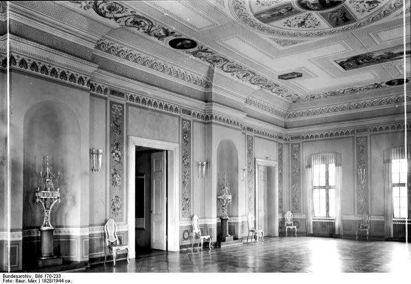 Potsdam.- Schinkelsaal im Schauspielhaus